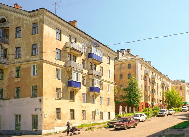 Улица Горького (Кирово-Чепецк)